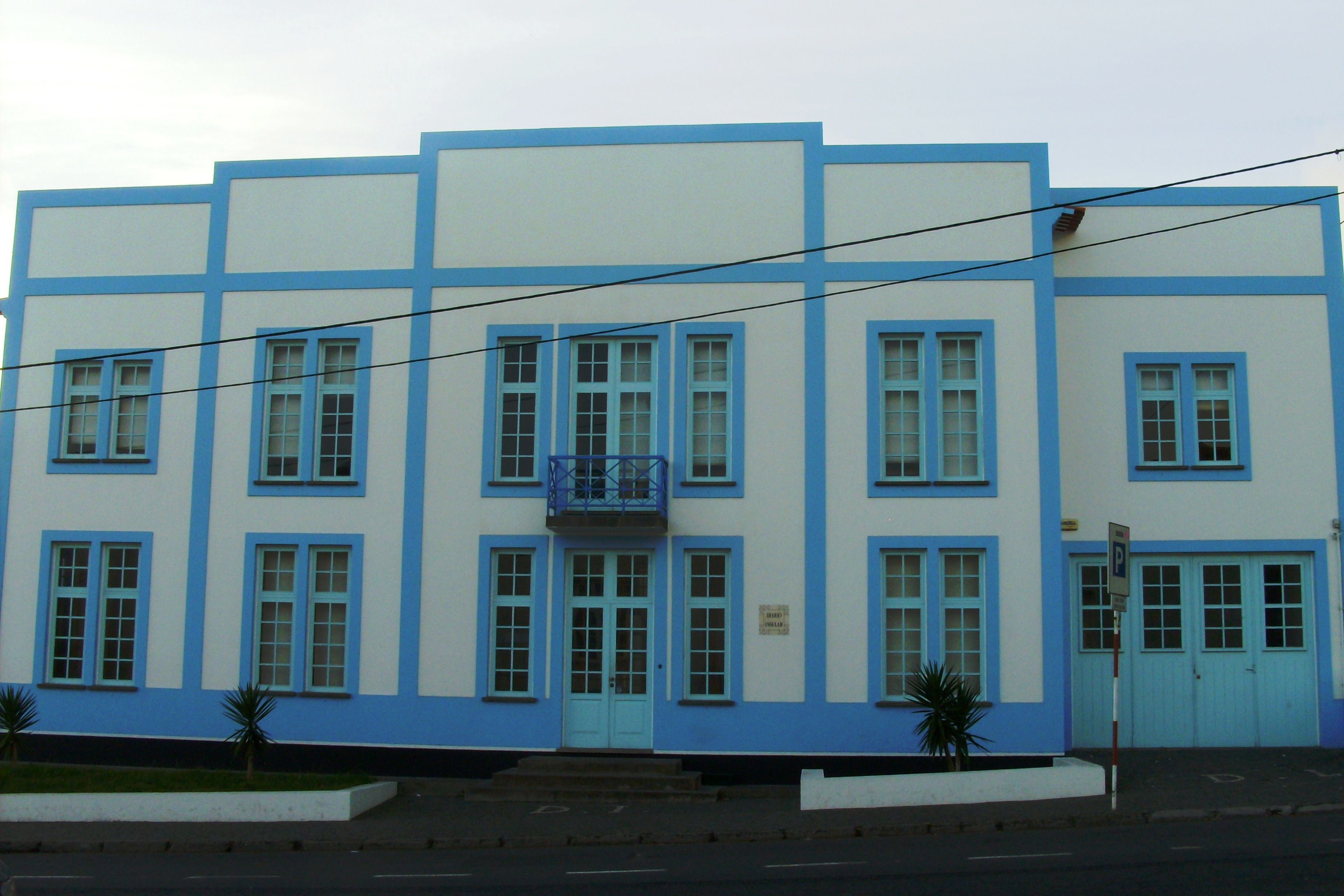 Edifício-sede do jornal "Diário Insular", Angra do Heroísmo, ilha Terceira, Açores.